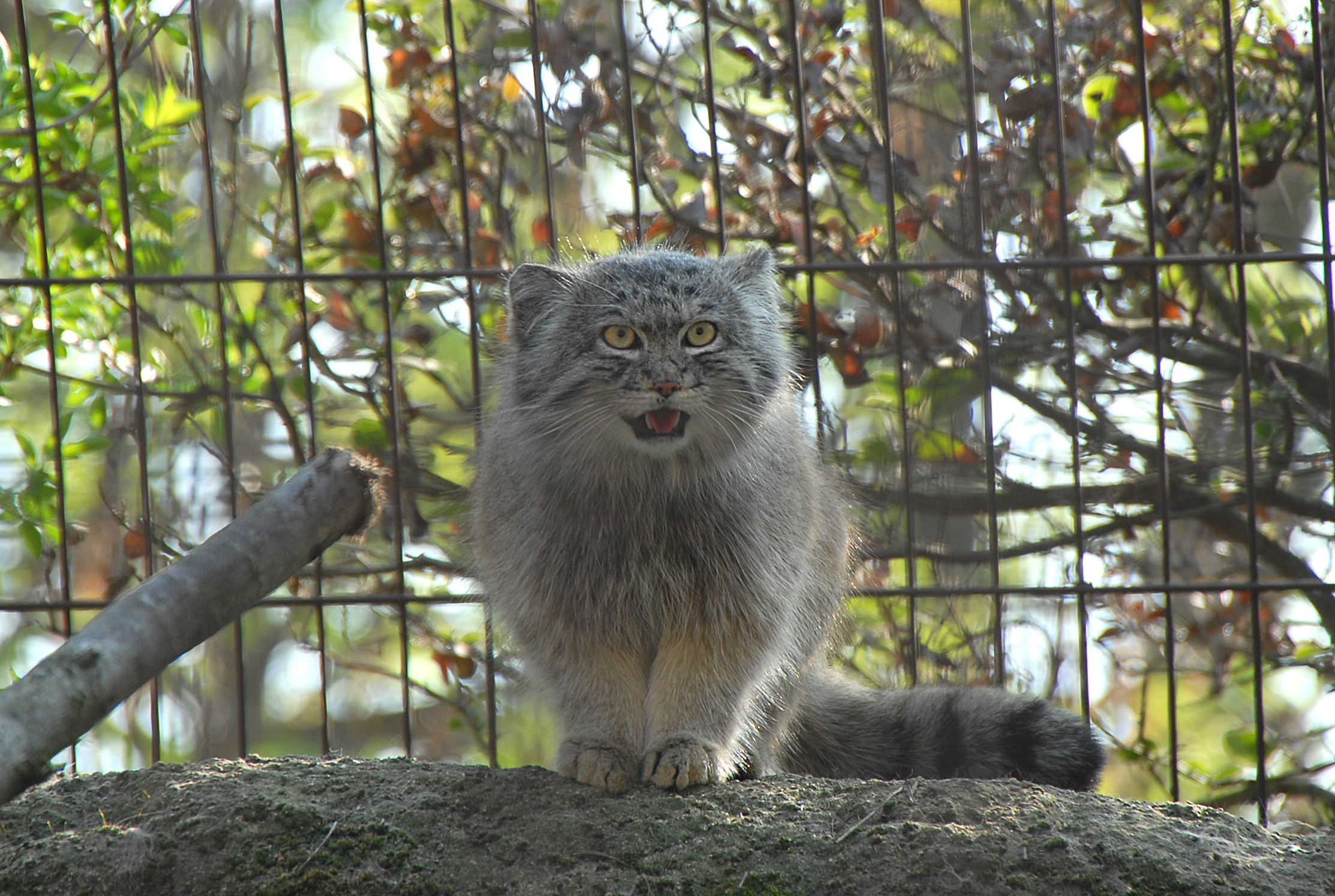 Chat de Pallas à la Ménagerie du Jardin des Plantes (Paris)